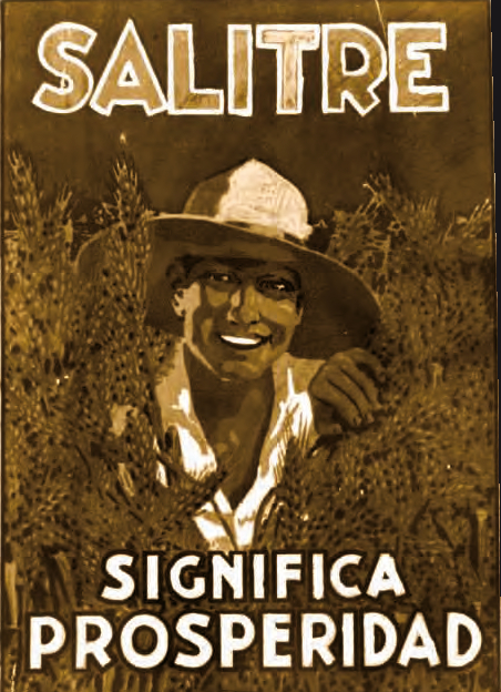 Imagen extraída del libro La masacre de la escuela Santa María de Iquique. Afiche del Salitre realizado por Camilo Mori